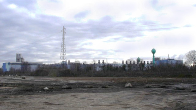 Laminoir à froid et lignes d'étamage d'Ebange.